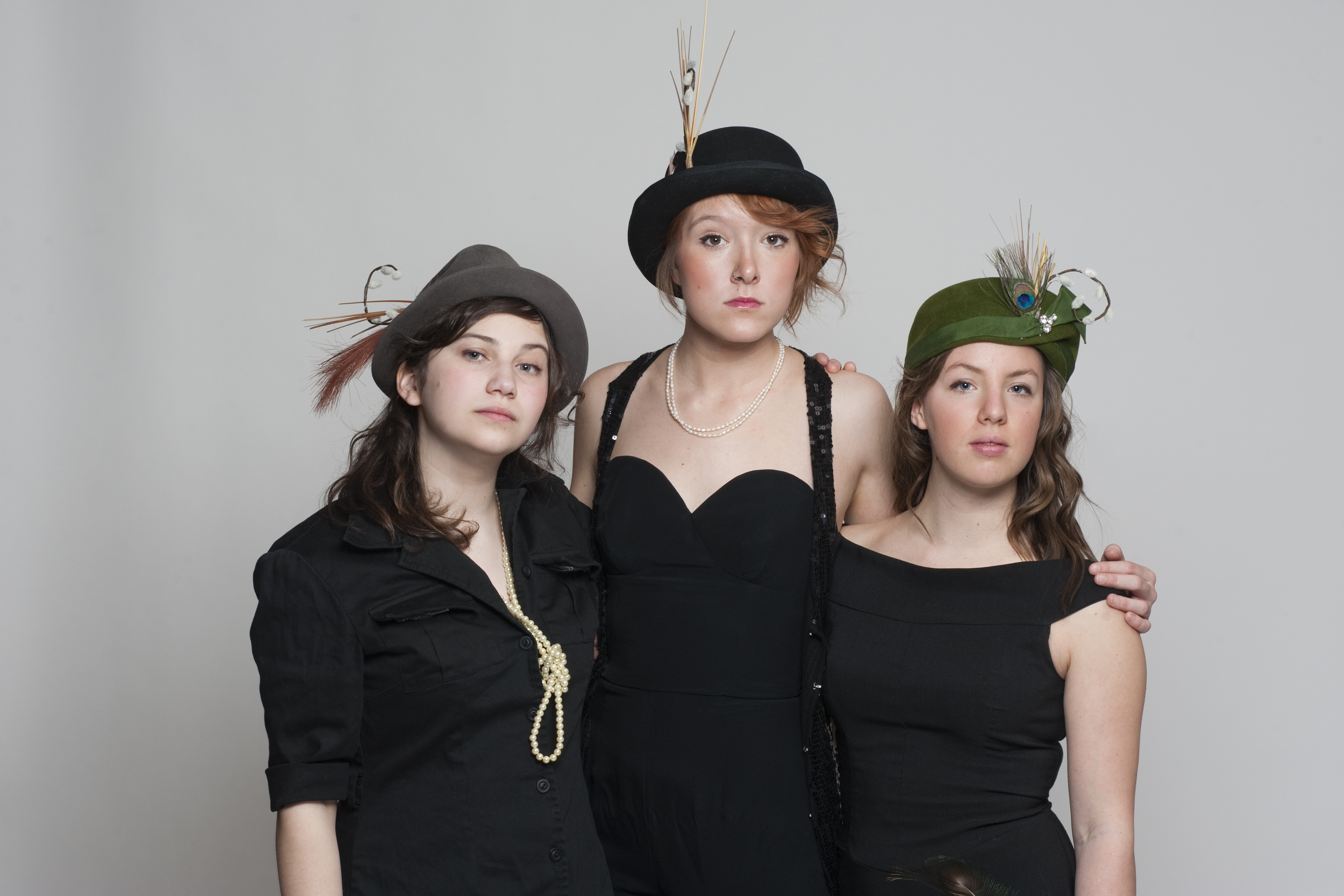 Julie Aubé, Katerine Noel, et Vivianne Roy.